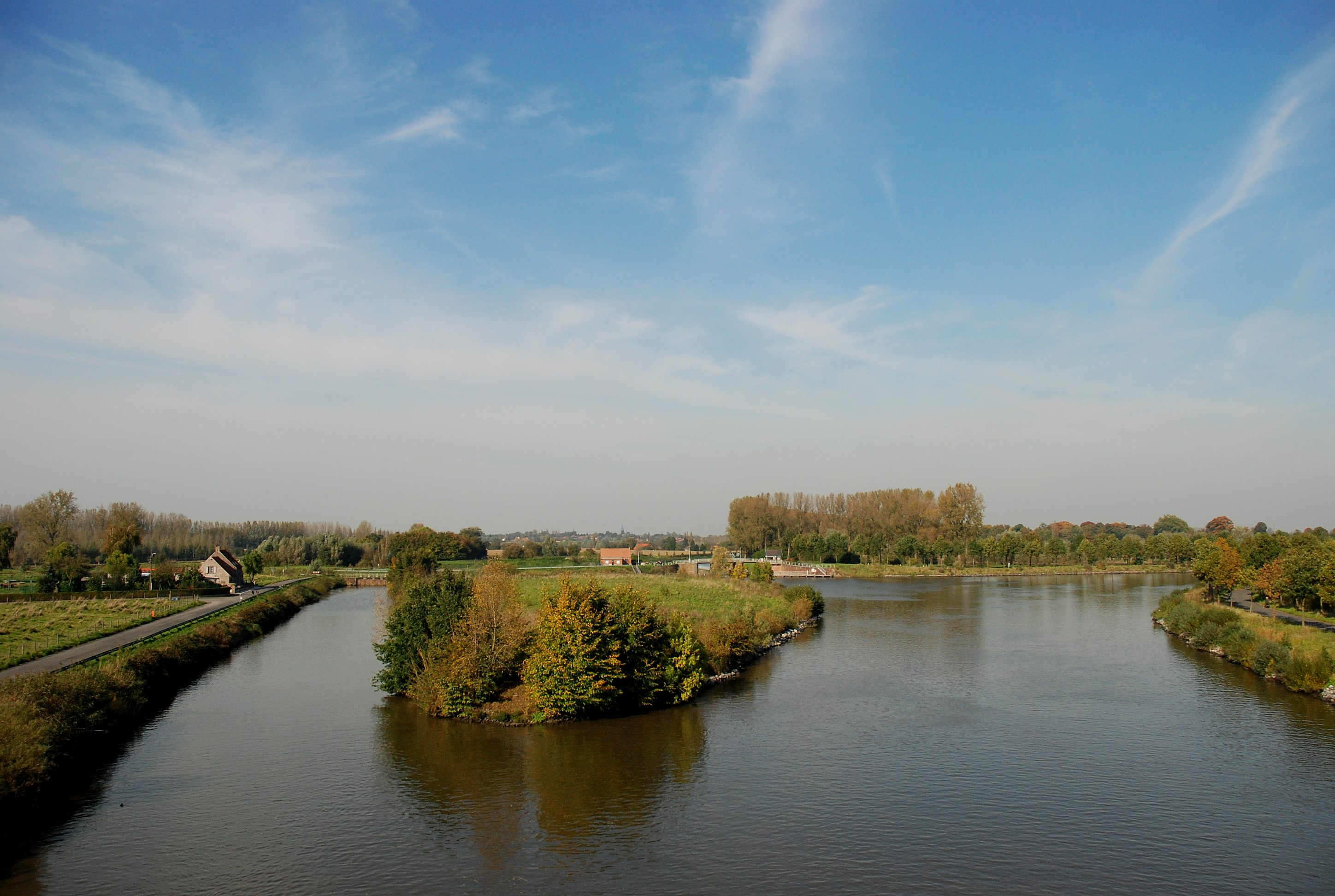 Eiland in het Schipdonkkanaal vlak voor de kruising met de Brugse Vaart (rechts Gent) en in de verte de Schipdonksluis. Foto genomen in noordelijke richting vanop de brug in Merendree over het Schipdonkkanaal